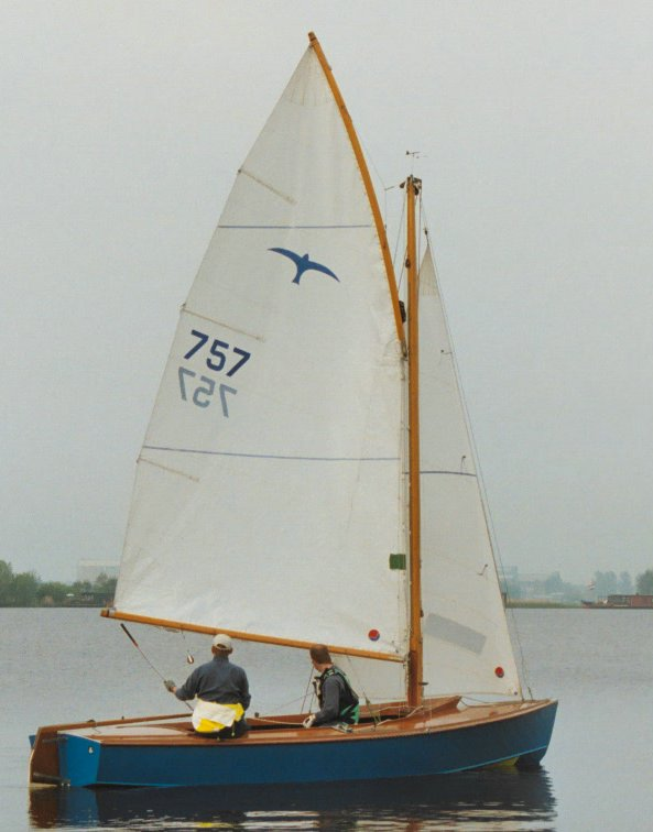 Houten wedstrijdvalk 757. Bouwjaar 1978. Foto eigenaar.